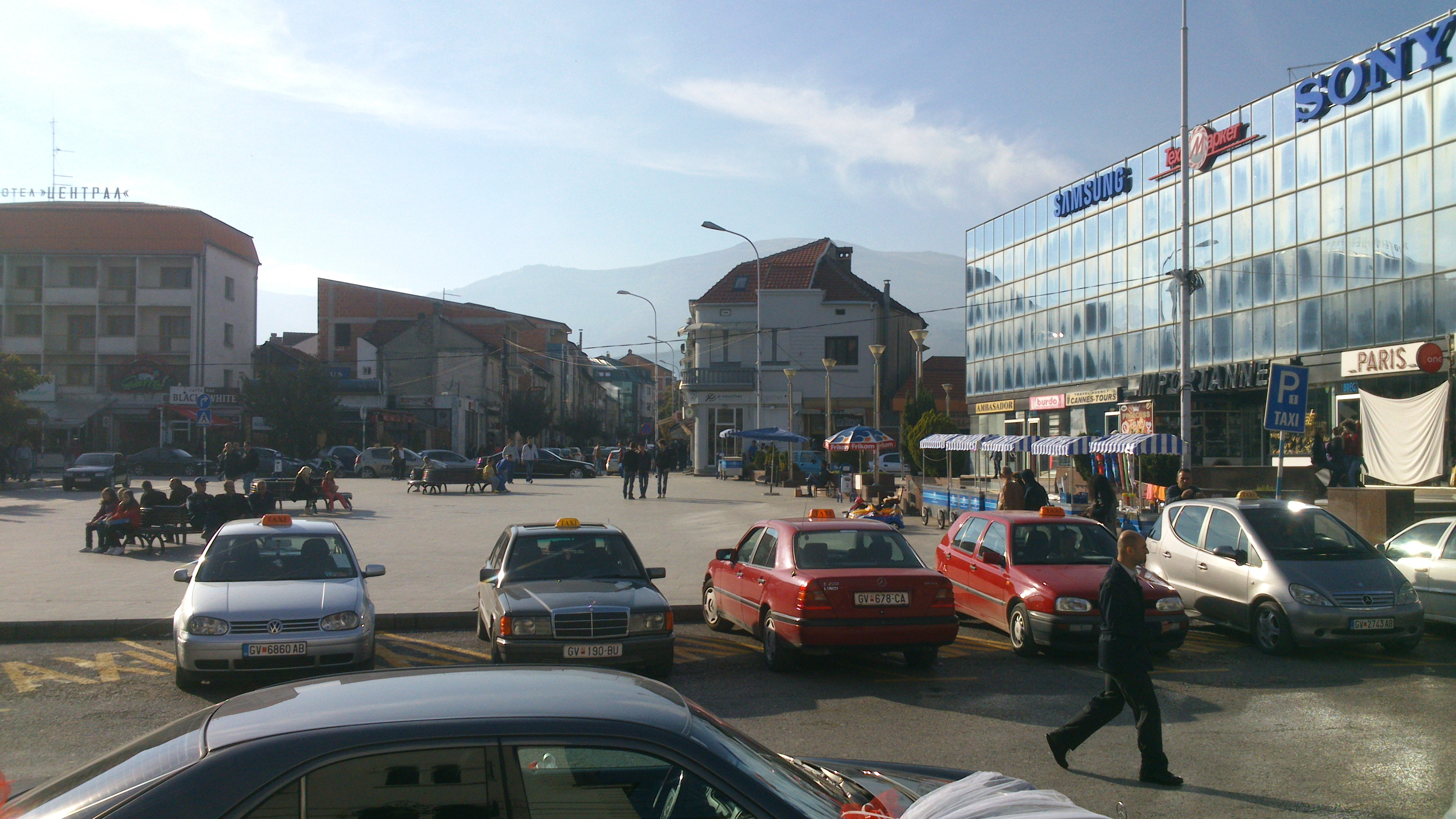 Gostivar Square, Macedonia